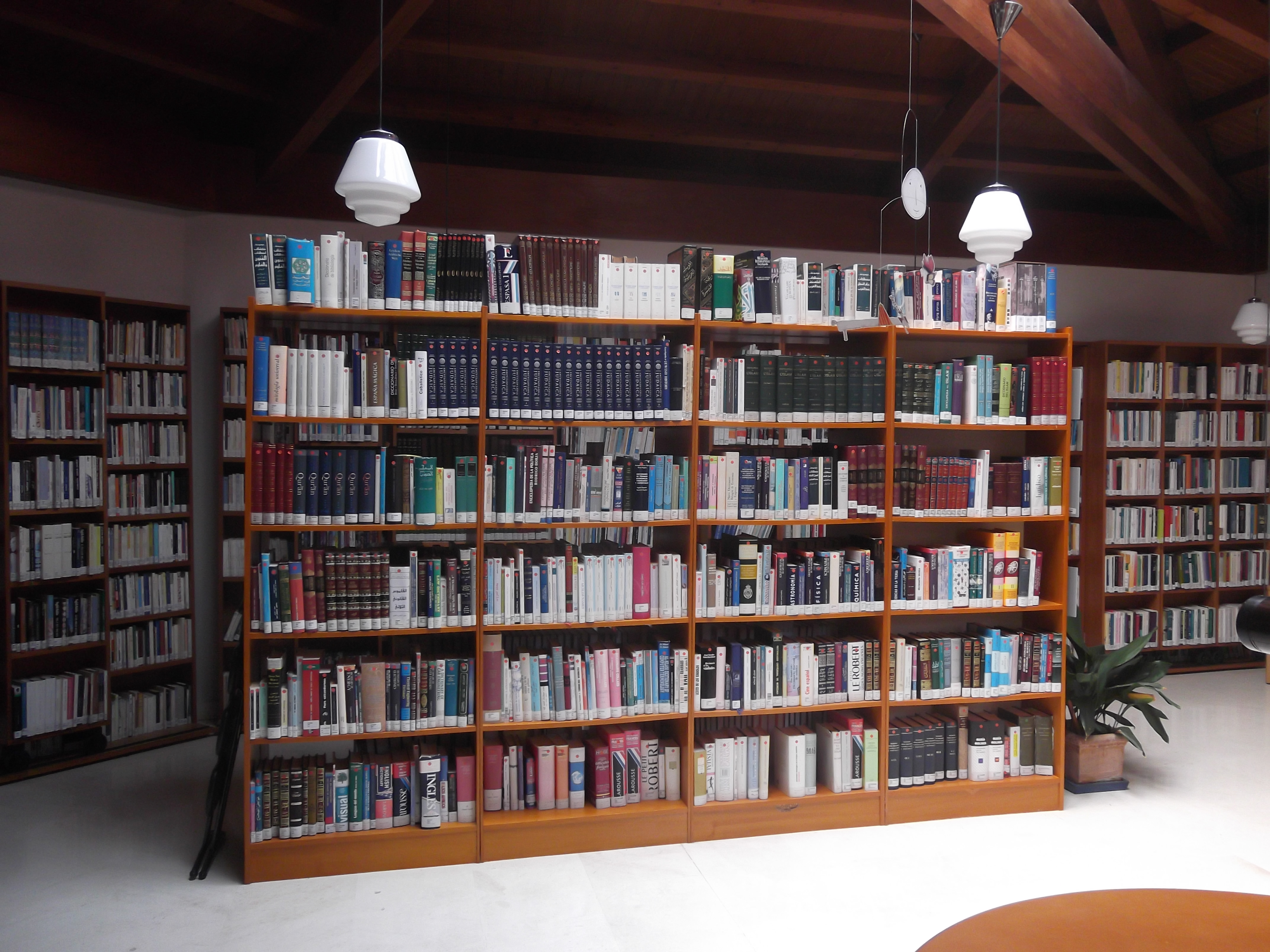 مكتبة مدرسة طليطلة للمترجمين بإسبانيا من الداخل.